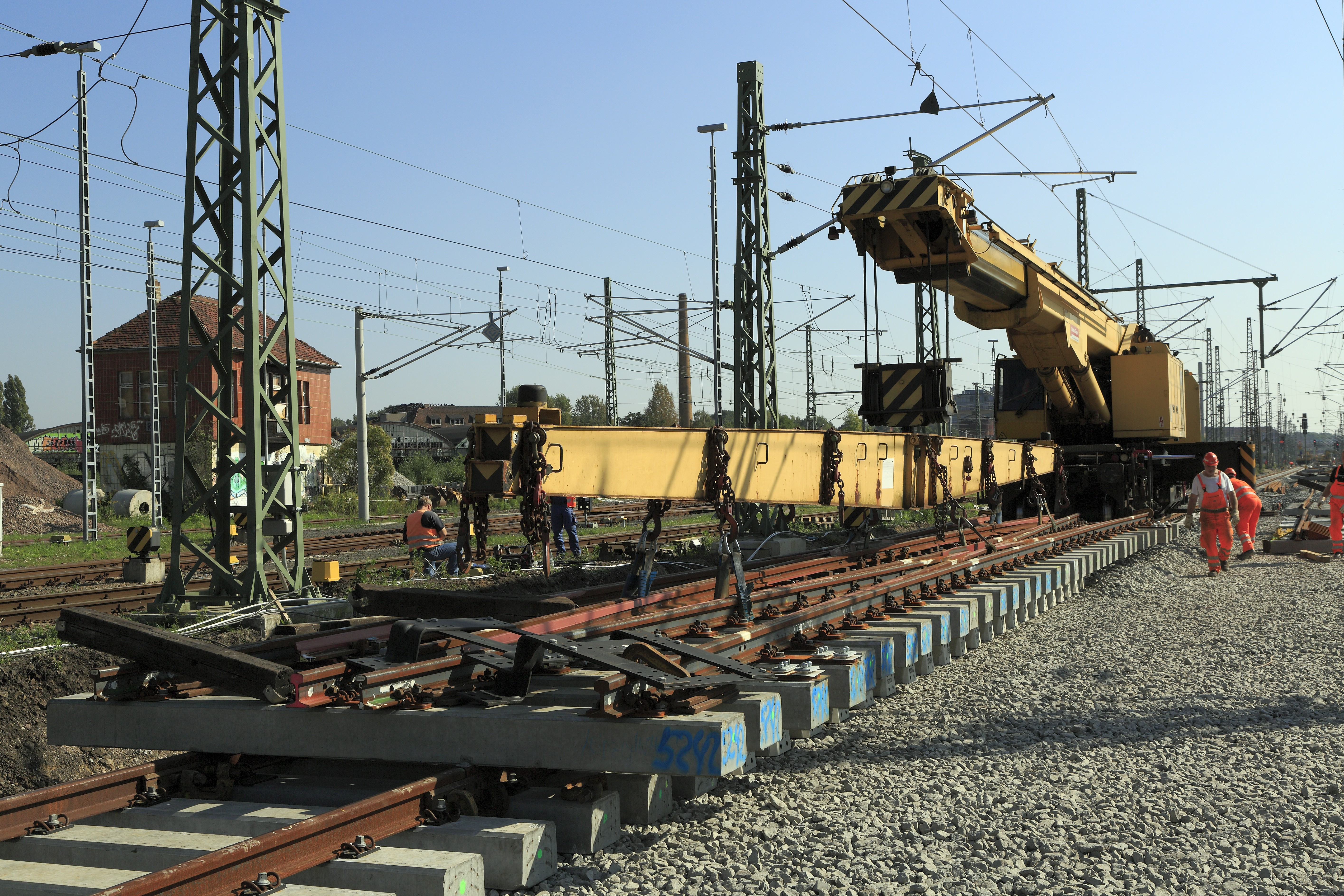 DKW 54-190-1:9, das Mittelteil mit Zungenvorrichtungen und Doppelherzstücken wurde vom Weichenwerk vormontiert geliefert und wird mittels Traverse in einem Stück eingebaut.